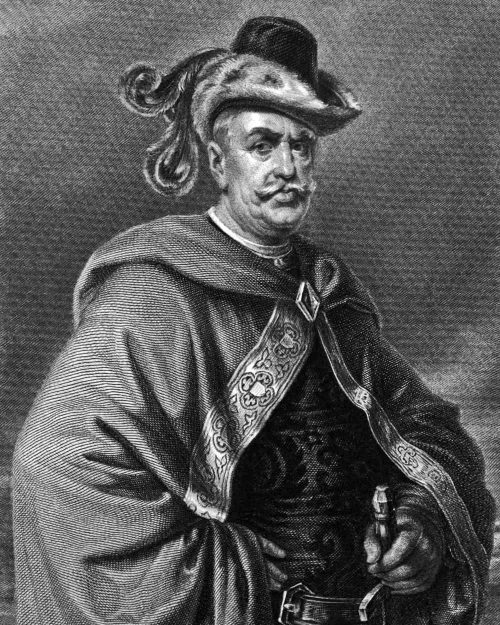 Gessler aus Friedrich Schillers Schauspiel Wilhelm Tell, als Stahlstich gestochen um 1859 nach einer Zeichnung von Friedrich Pecht